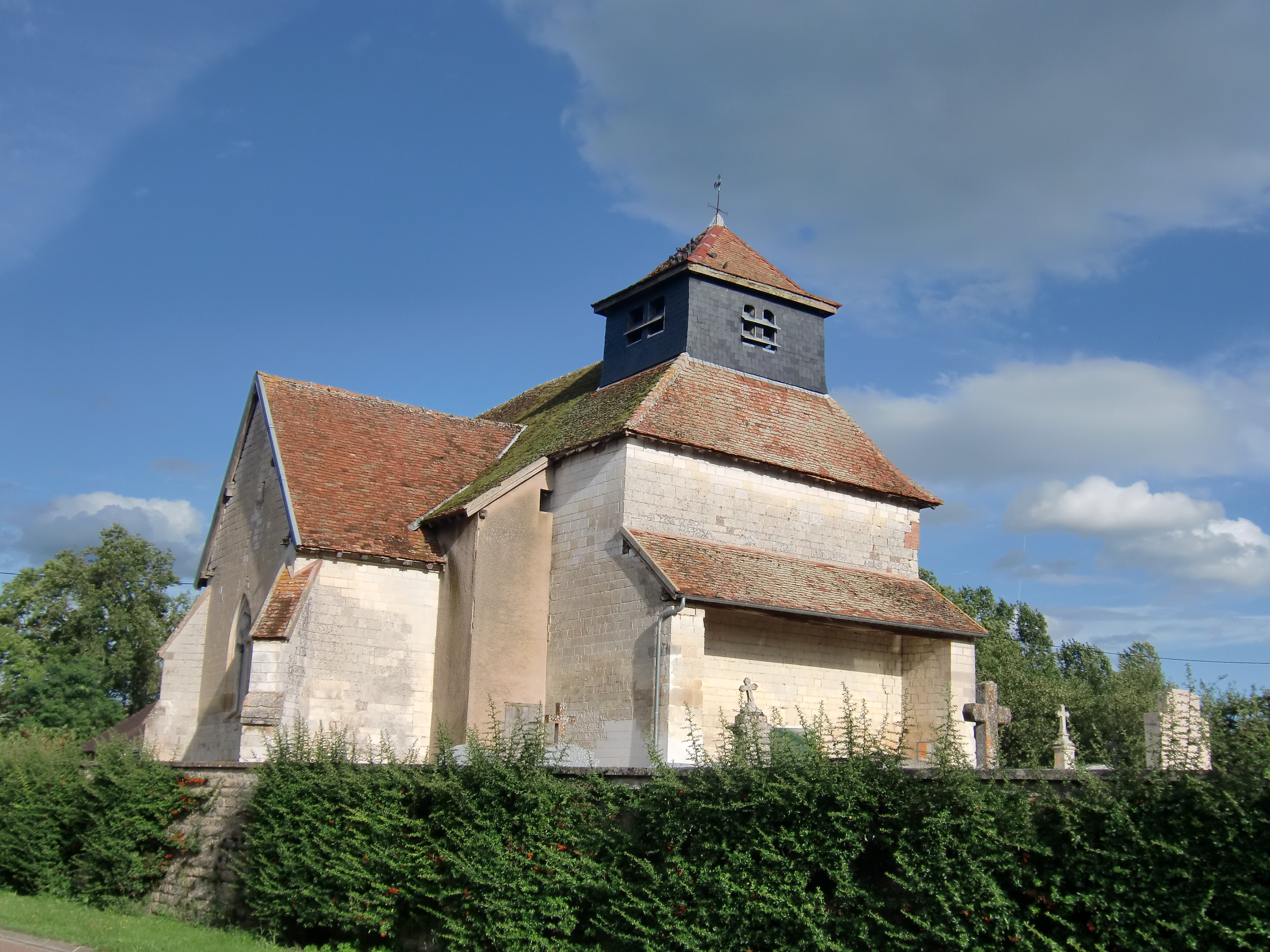 église de l'Assomption de la Vierge à Précy-Notre-Dame (Aube, Champagne, France)